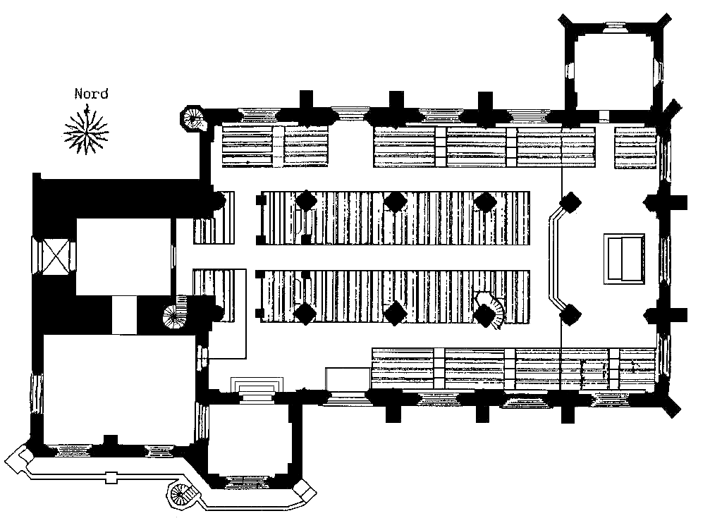 Grundriß der Sternberger Stadtkirche